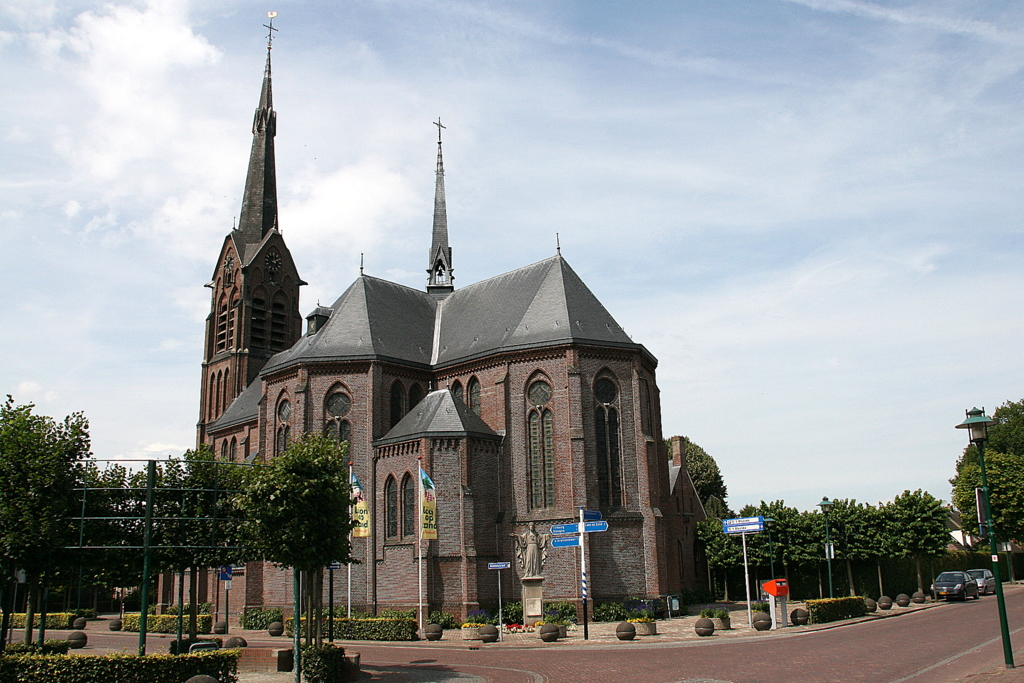 De Moer - Middelstraat 26 - St. Joachimkerk